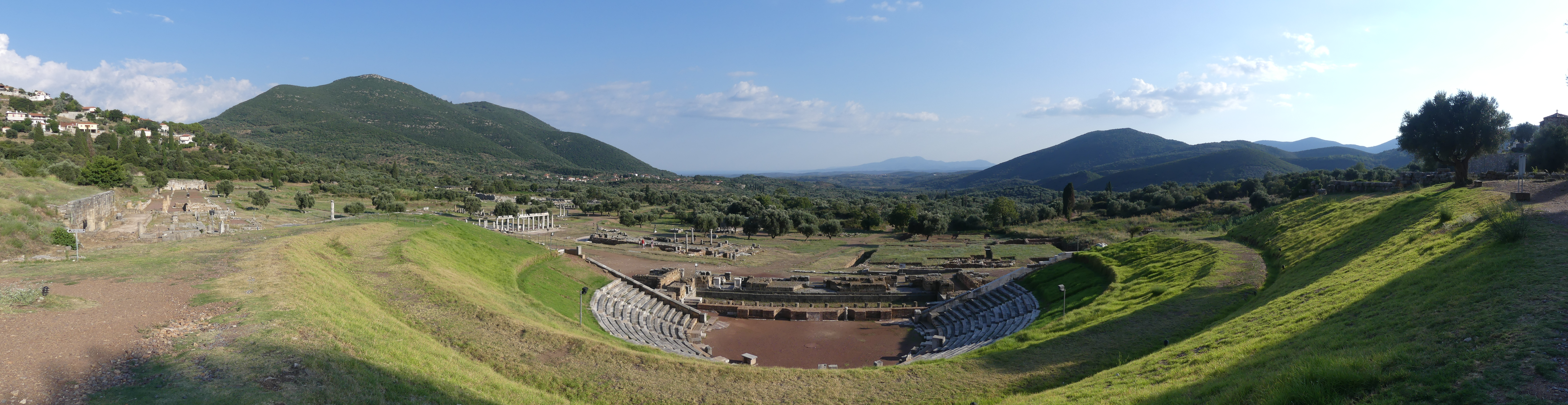 Θέατρο Μεσσήνης«Θέατρο Μεσσήνης»